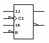 IEC-symbool van een JK-flip-flop met complementaire uitgangen, negatieve actieve flank en a-synchrone reset.